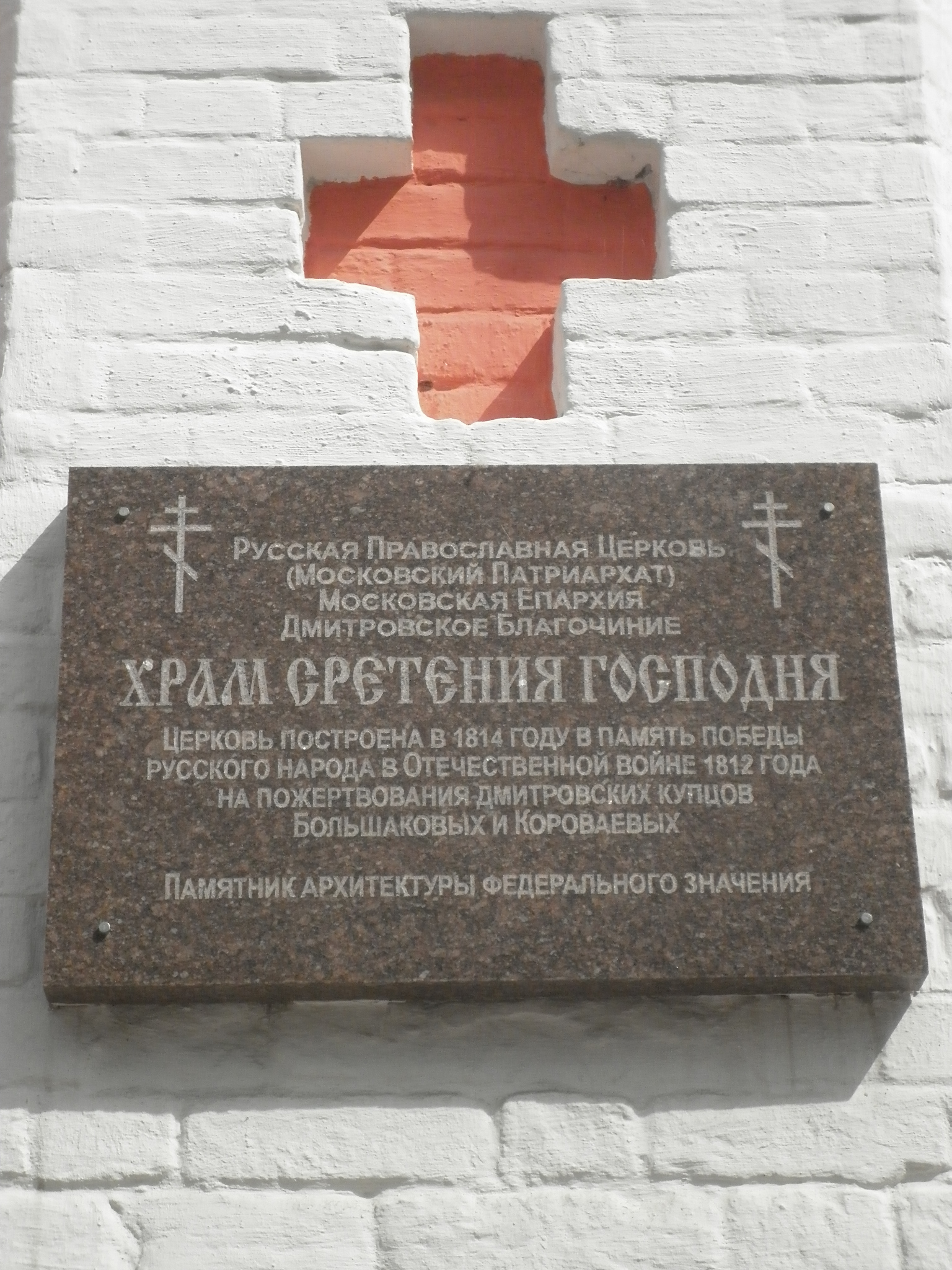 (Москва и Московская область, Дмитров, Профессиональная улица, 65)